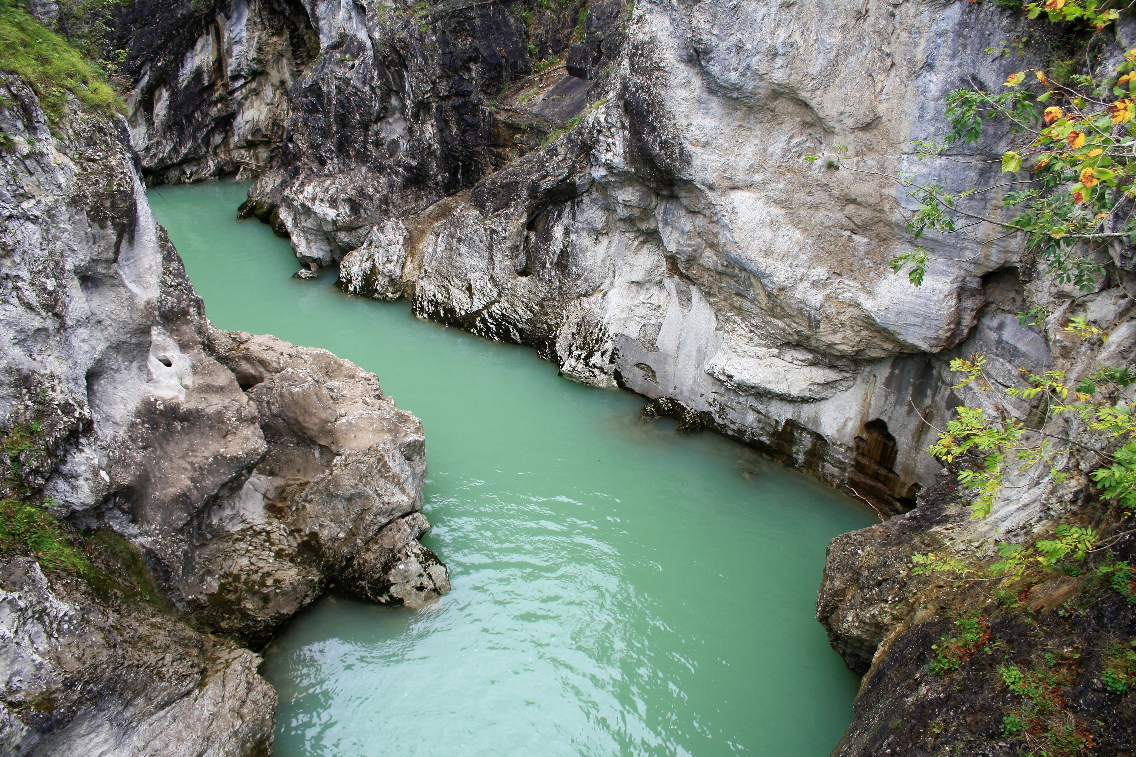 Lechklamm, Teil des Geotops „Lechfall und Klamm (Mangfall)“ bei Füssen und gelegen im Landschaftsschutzgebiet „Schutz von Landschaftsteilen im Bereich des Faulenbacher Tales, des Lechtales, des Schwanseetales und des Alpseegebietes im Landkreis Füssen“ (LSG-00078.01), Bayern.